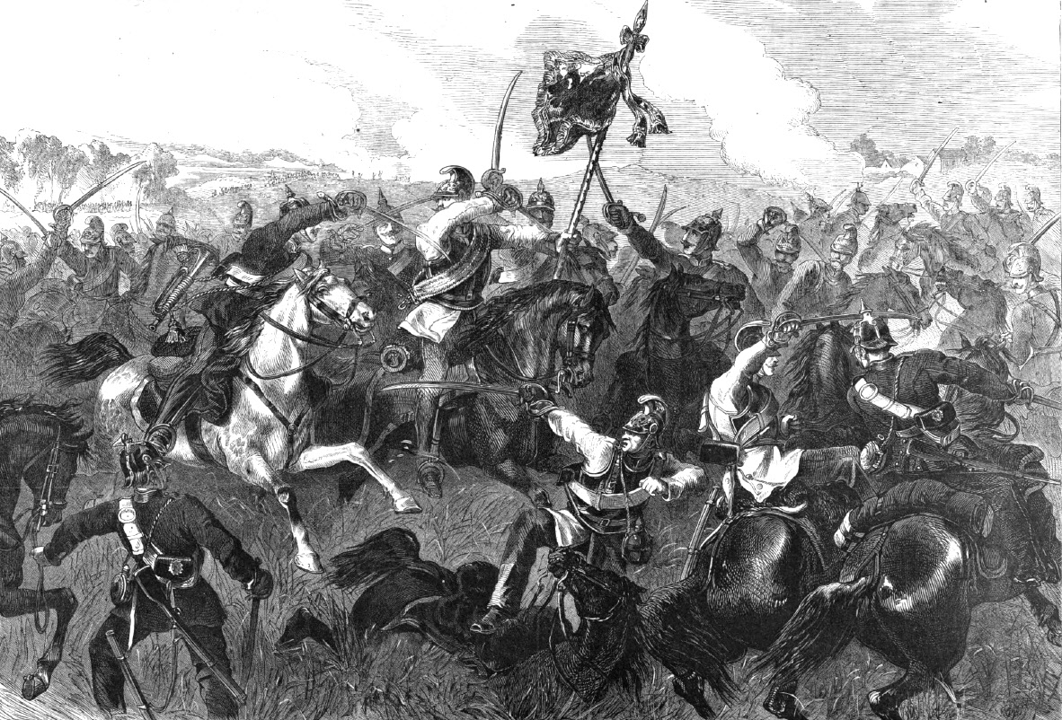 Reitergefecht bei Nachod am 27. Juni 1866